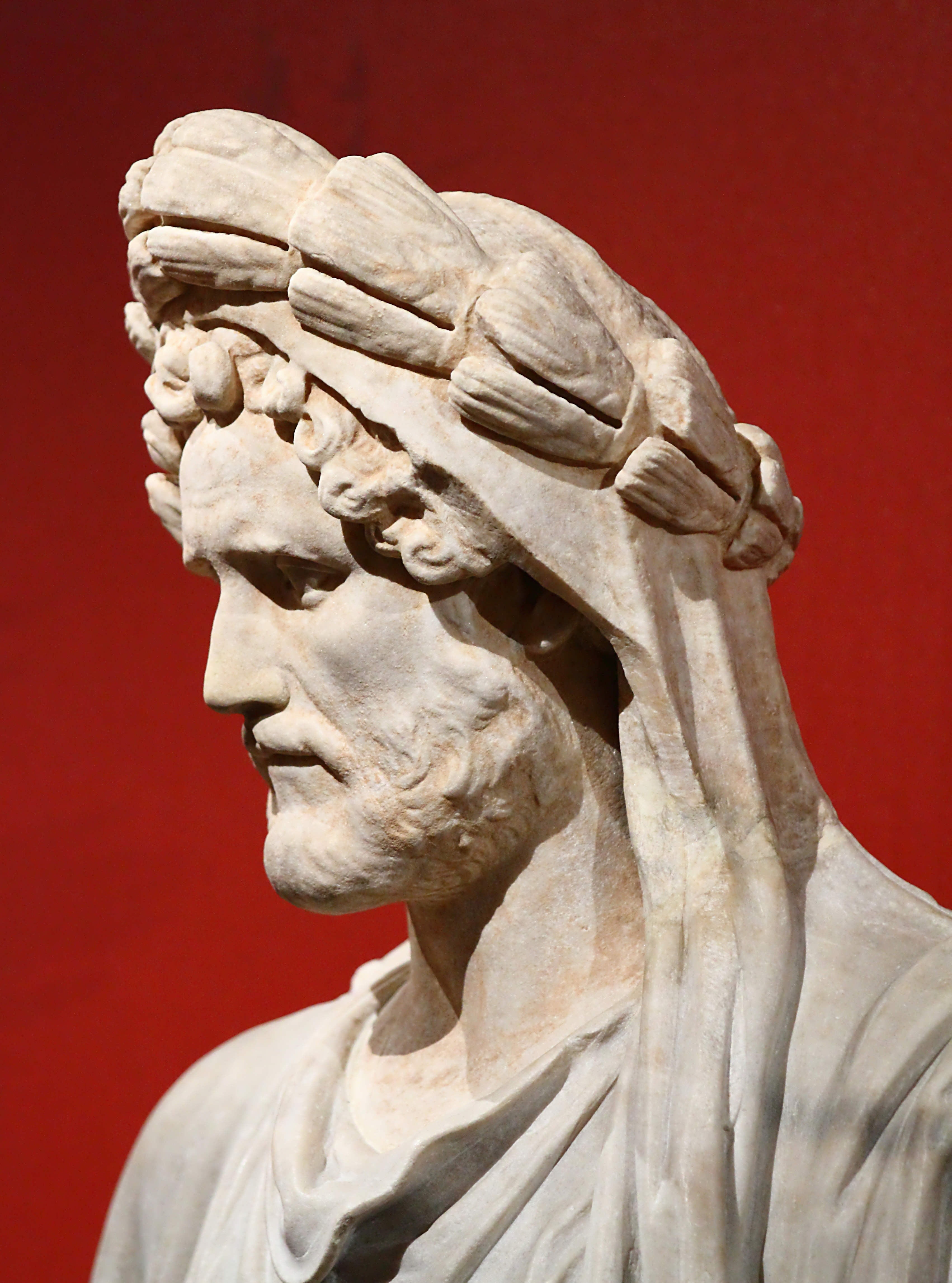 Empereur de 138 à 161, type « Busti 284 »